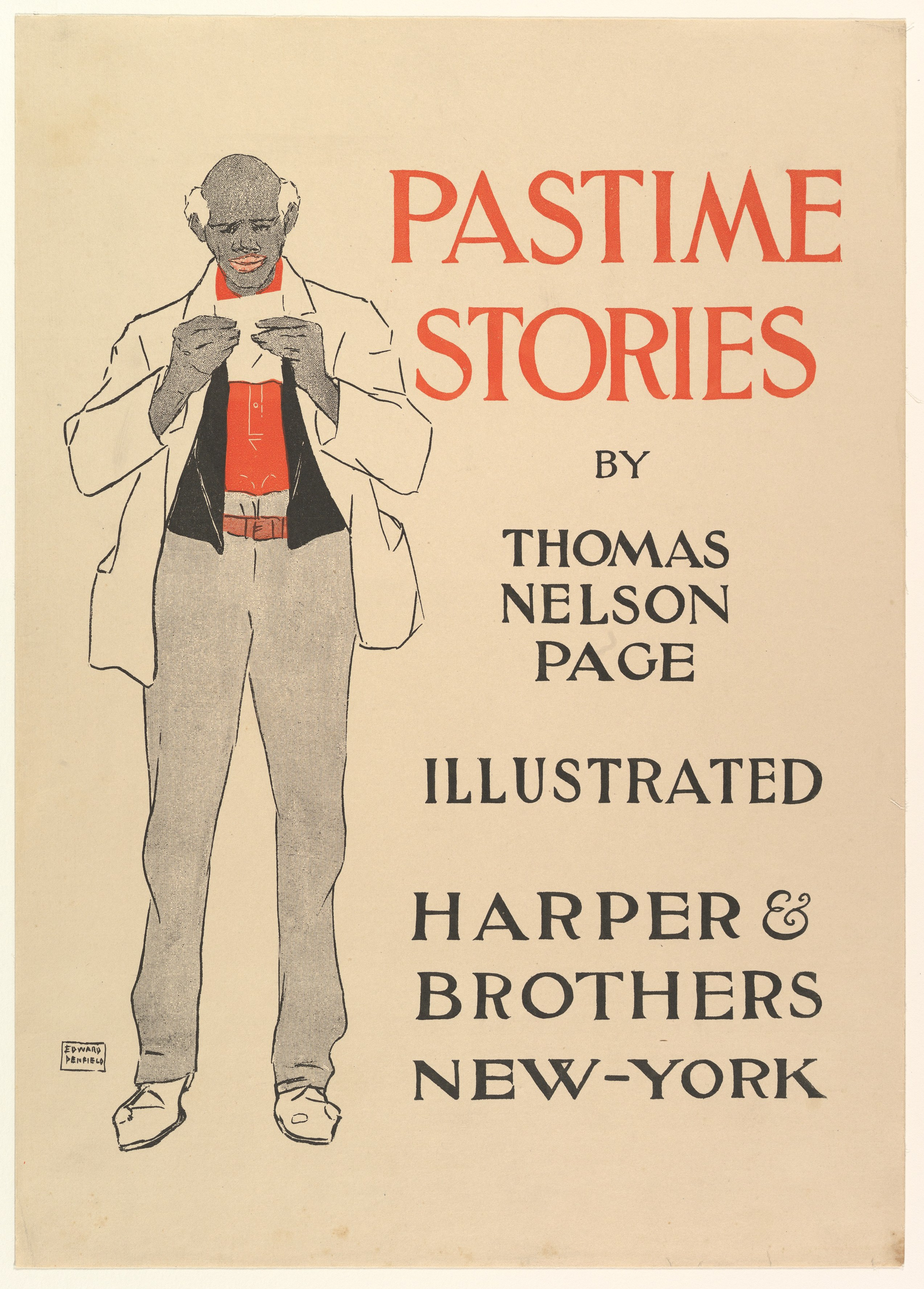 Print; Poster; Prints